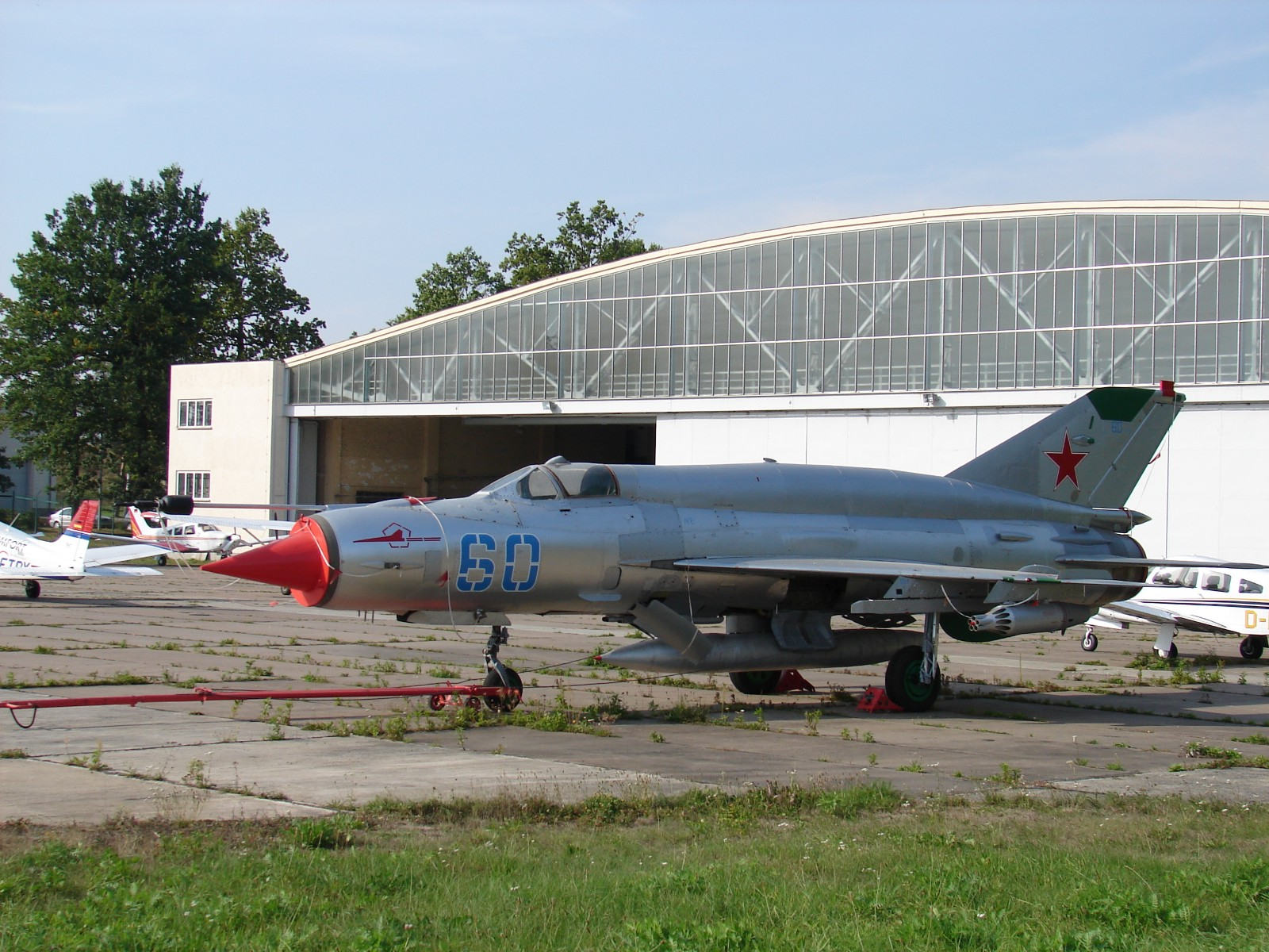 MiG 21 SMT auf dem Flughafen Altenburg-Nobitz. Besitzer: "Andreas Grüner", Eigentümer: Flugplatz Altenburg.